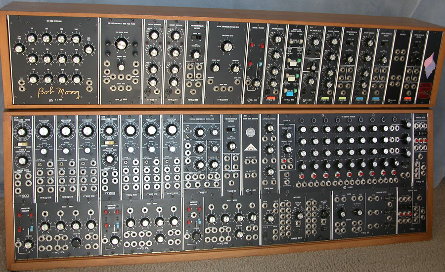 Sintetizzatore Moog Modular 55